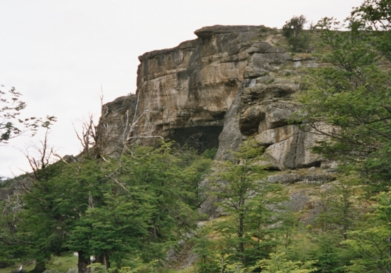 Außenansicht der Cueva del Milodón bei Puerto Natales (Patagonien/Chile) This is a photo of a national monument in Chile: 960